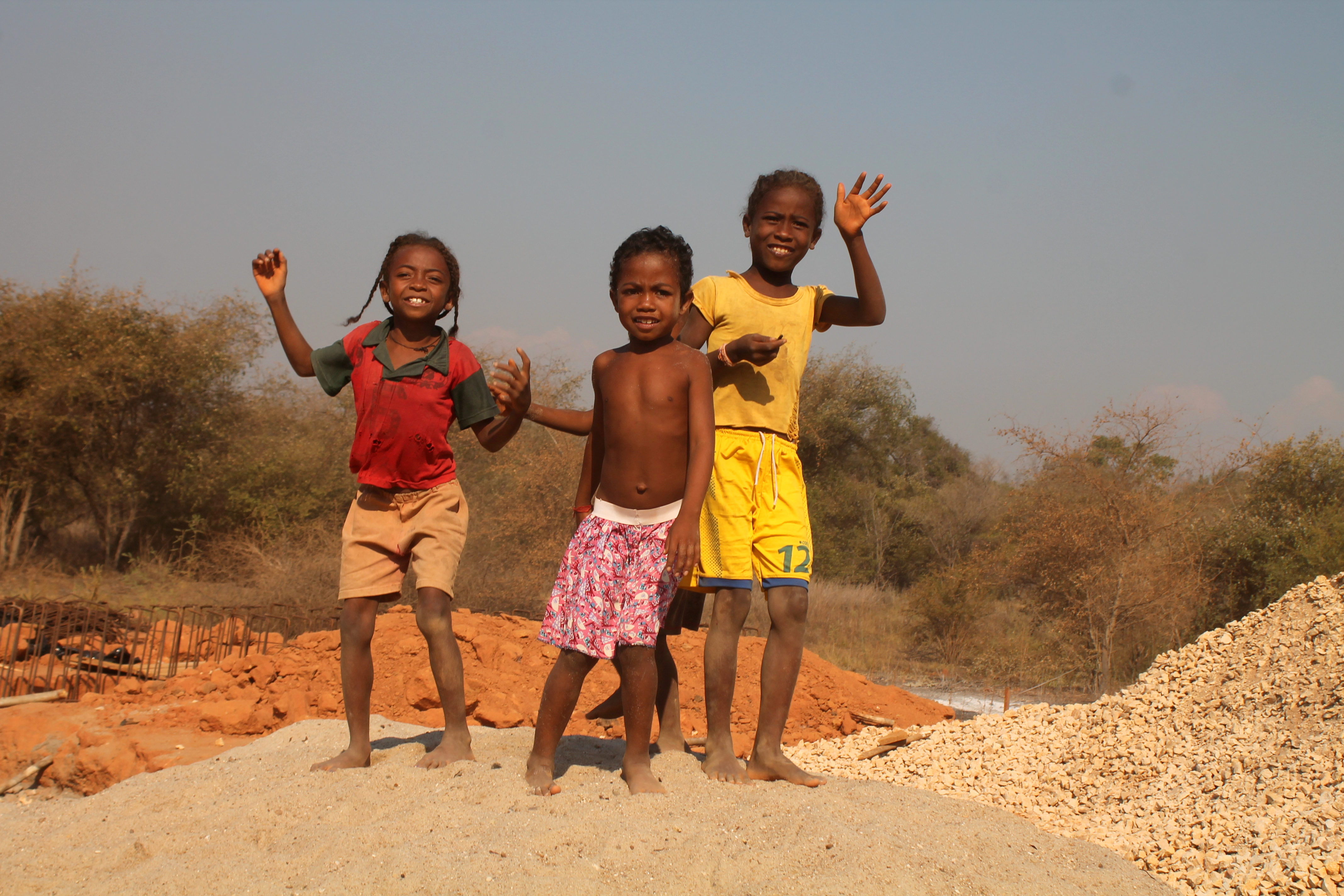 Sakalava